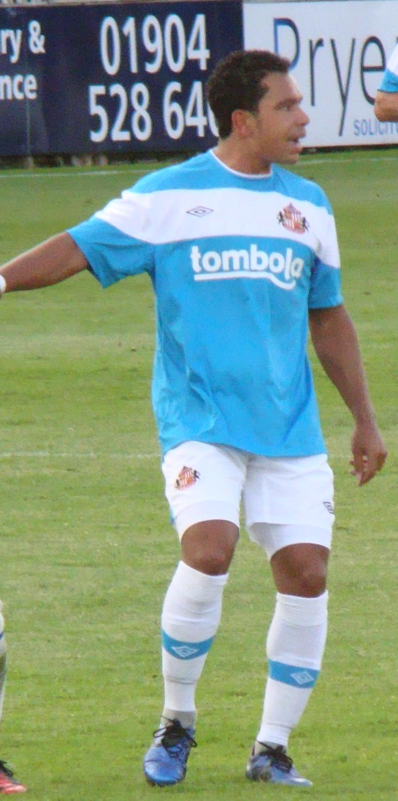 YCFC vs SAFC